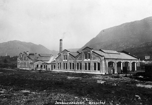 NSB verksted Kronstad ca. 1910 / 1920